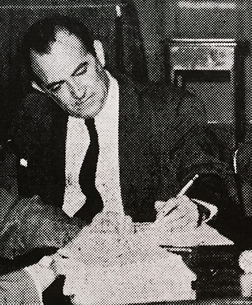 Los escritores venzolanos Miguel Otero Silva, Ramón Díaz Sánchez y Mariano Picón Salas.